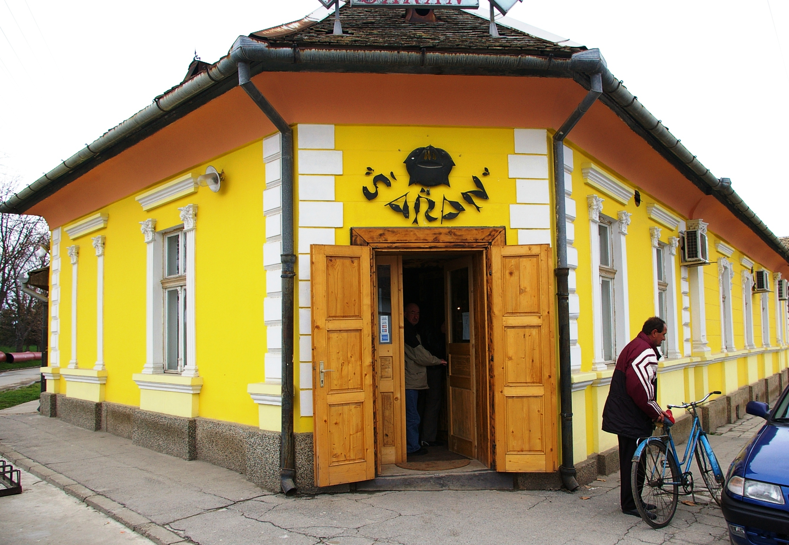 Traditionsreiches Gasthaus Saran (zum Karpfen)